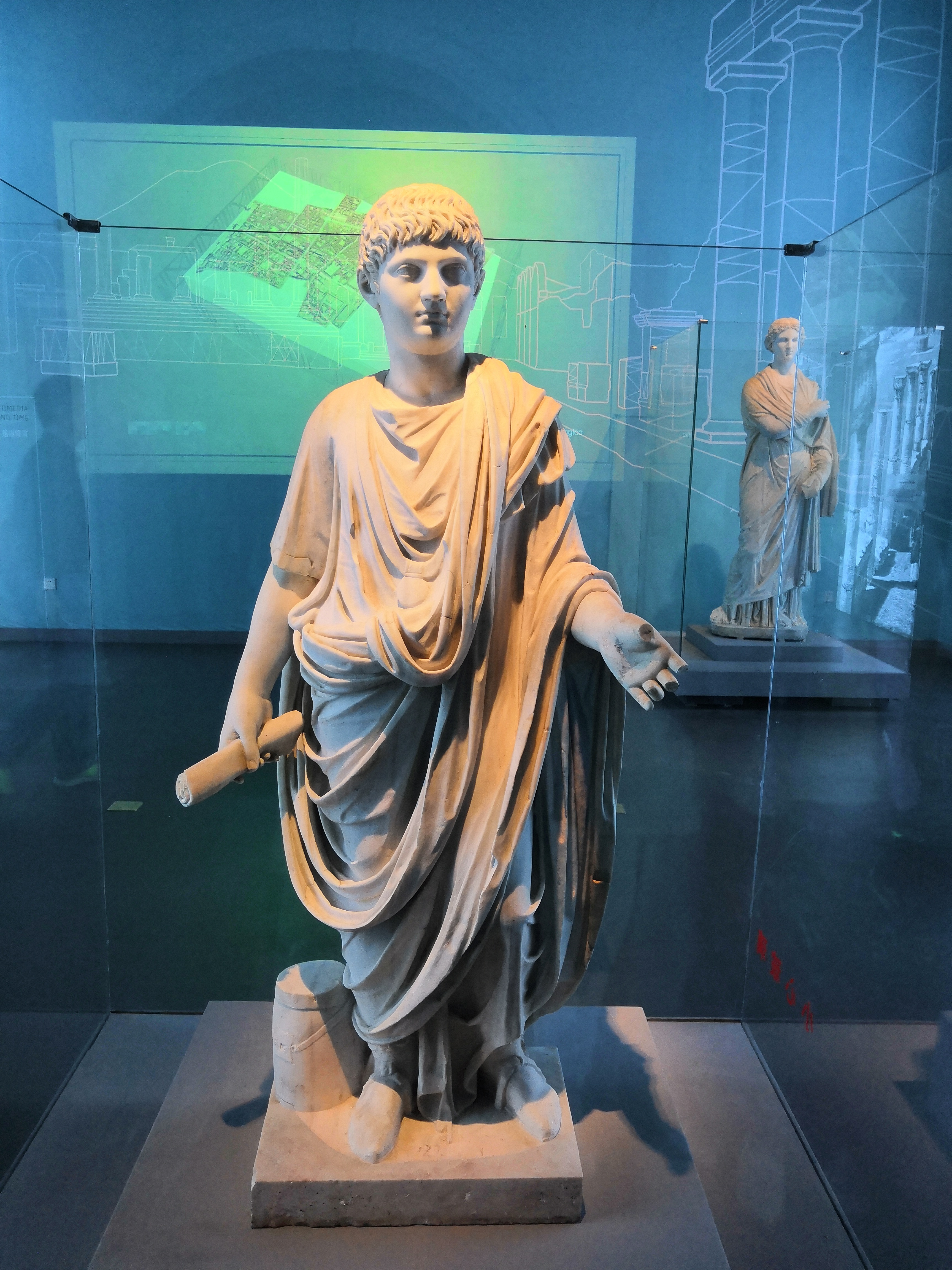 中文（中国大陆）: 天津博物馆巡展的庞贝儿童石塑